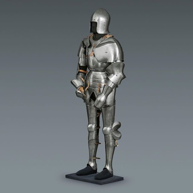 hergestellt vom Mailänder Waffenschmied Tomasso Negroni da Ello, genannt Missaglia. Privatbesitz des Grafen Trapp, Churburg Südtirol